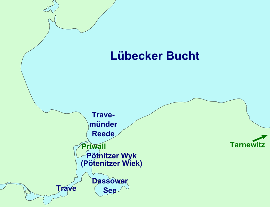 Karte der Lübecker Bucht; Lübecker-Bucht-Fall